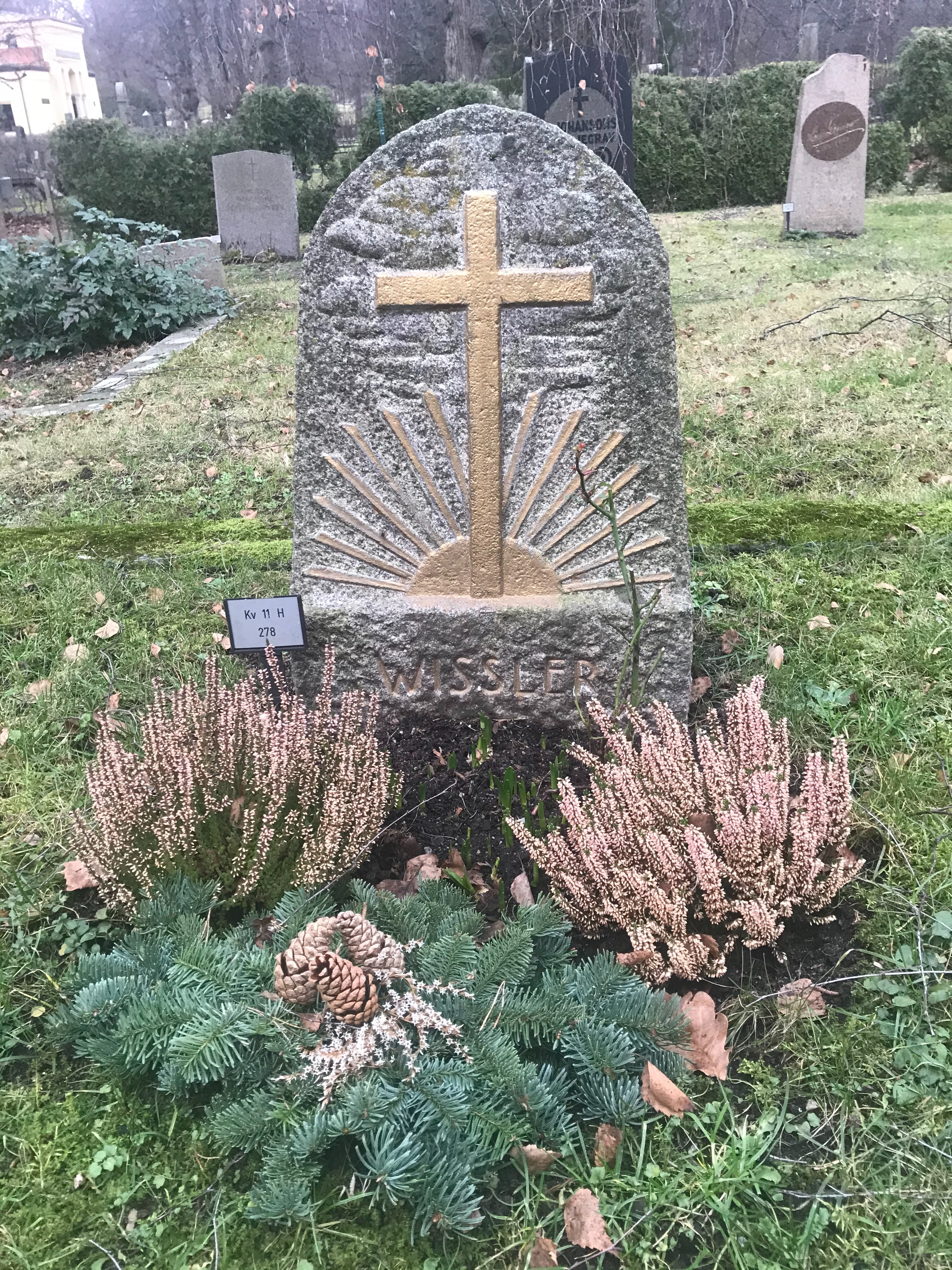 Norra Begravninsplatsen Kvarter: 11H Gravplats: 00278 Bess Wissler (Q23989419) Anders Wissler (Q6245136)